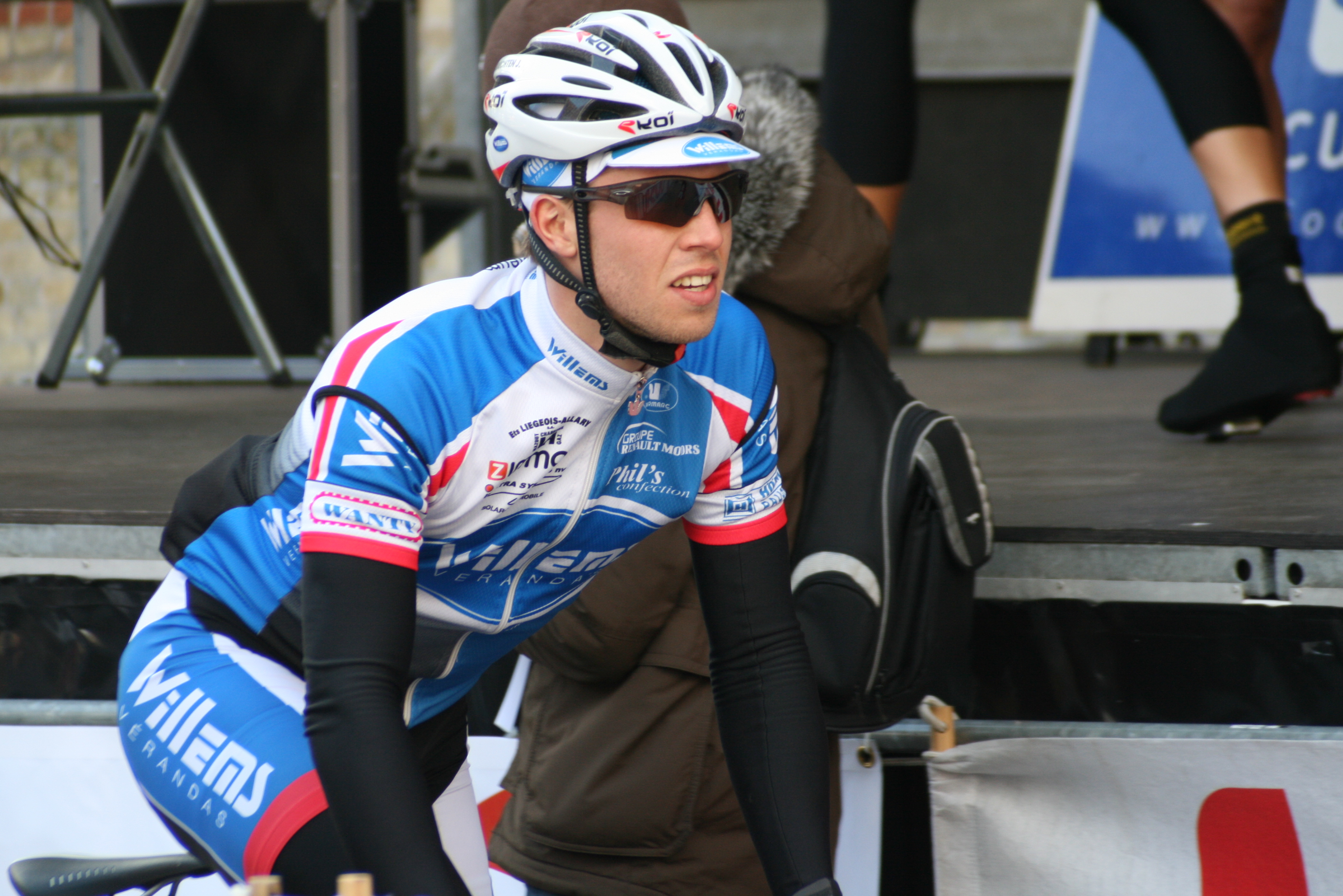 Trois jours de Flandre occidentale 2010, Jonas Van Genechten